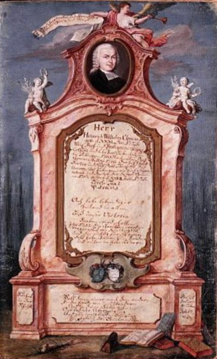 Totenbuch der Tübinger Stiftskirche: Heinrich Wilhelm Clemm - Tübinger Professor (*31.12.1725; †27.7.1775)